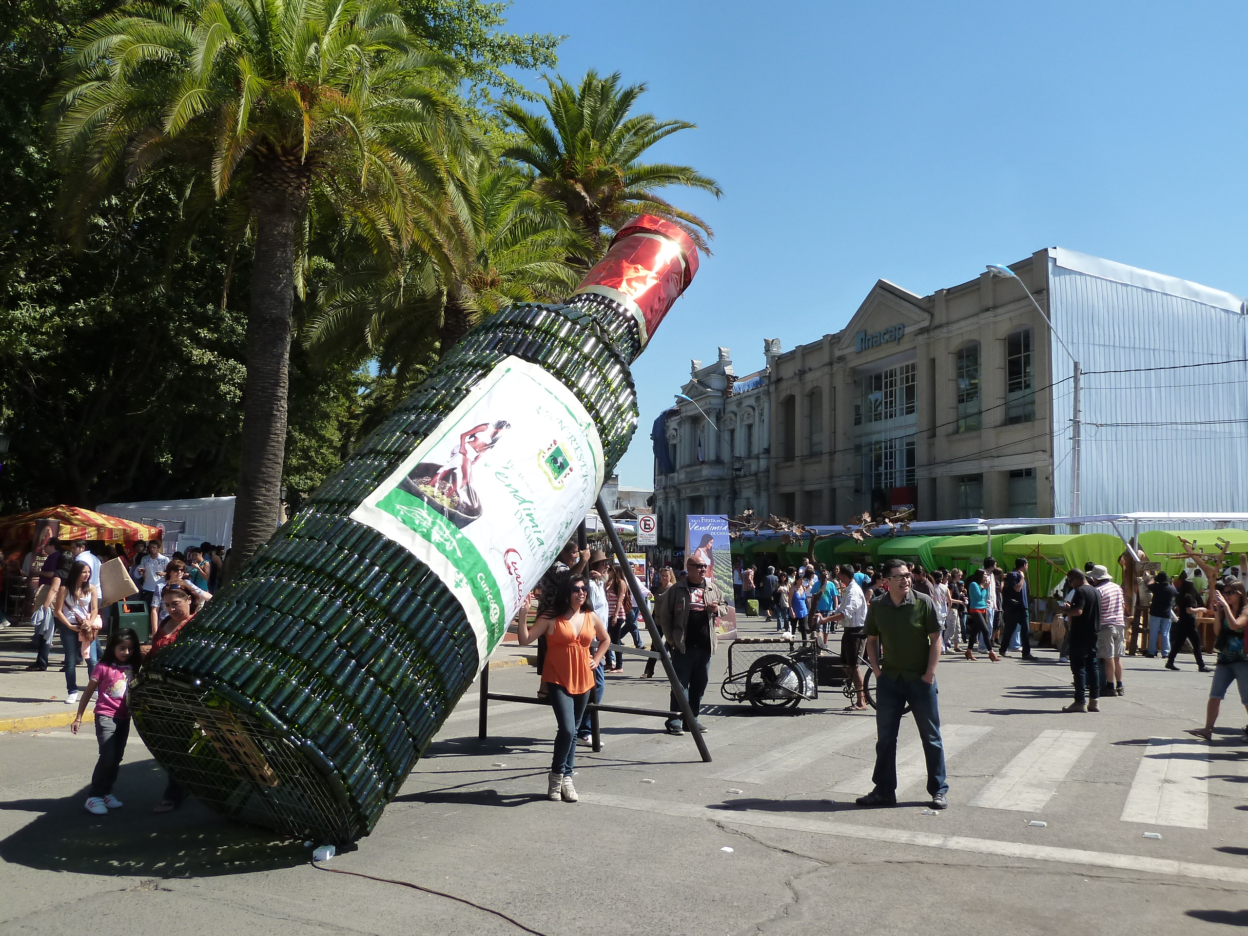 Fiesta de Vendimia 2012 This is a photo of a national monument in Chile: 142